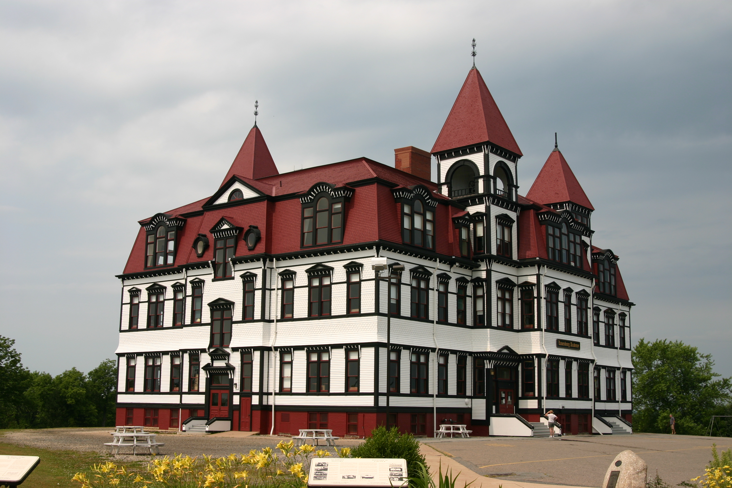 Lunenburg Academie, Lunenburg, Nova Scotia, Canada